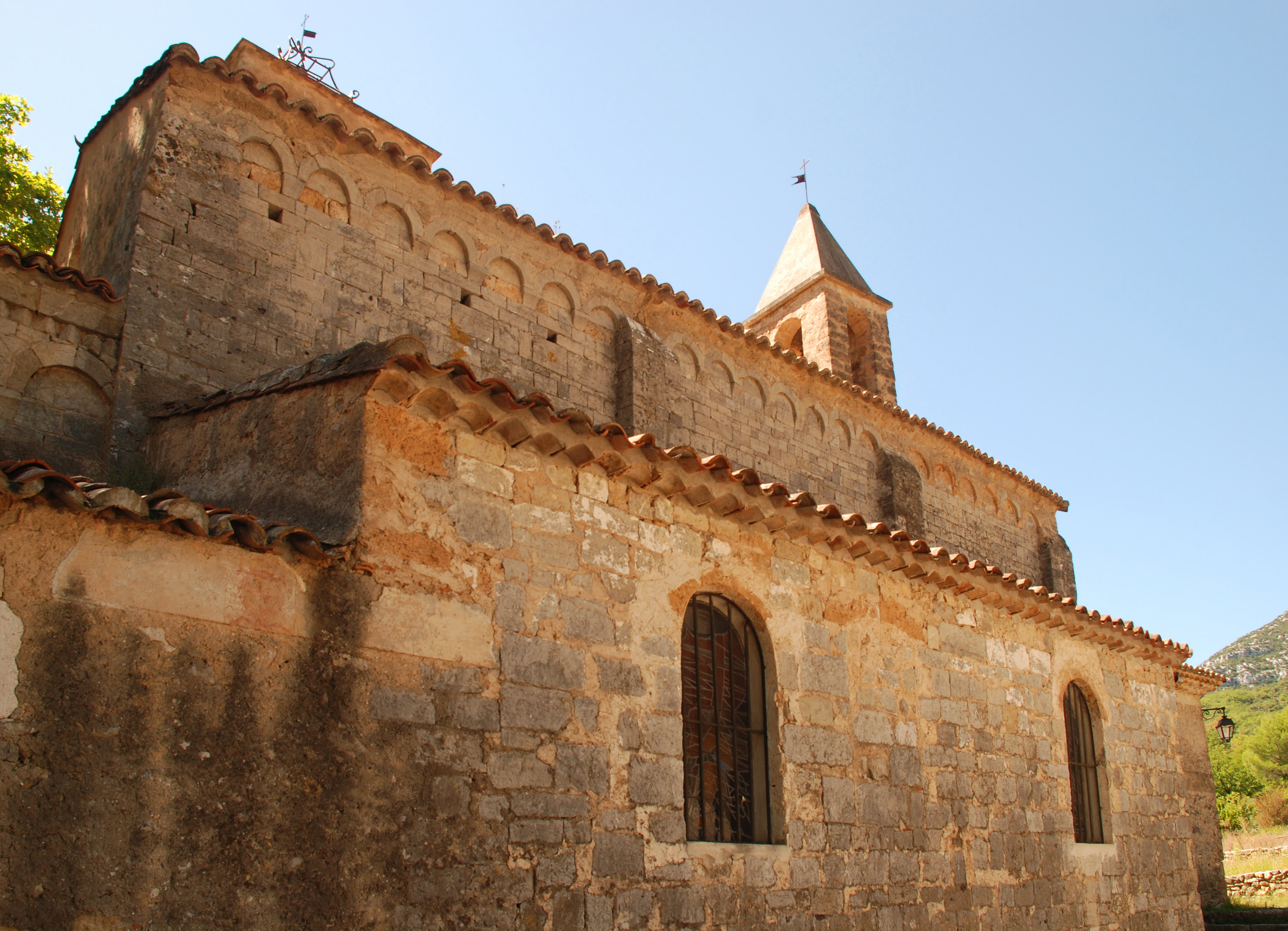 France - Hérault - Église de Saint-Jean-de-Buèges